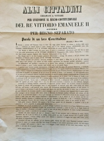 Alli Cittadini chiamati a votare per annessione al Regno Costituzionale del Re Vittorio Emanuele II ovvero per Regno separato. Parole di un loro Concittadino. Mirandola 4 marzo, 1860